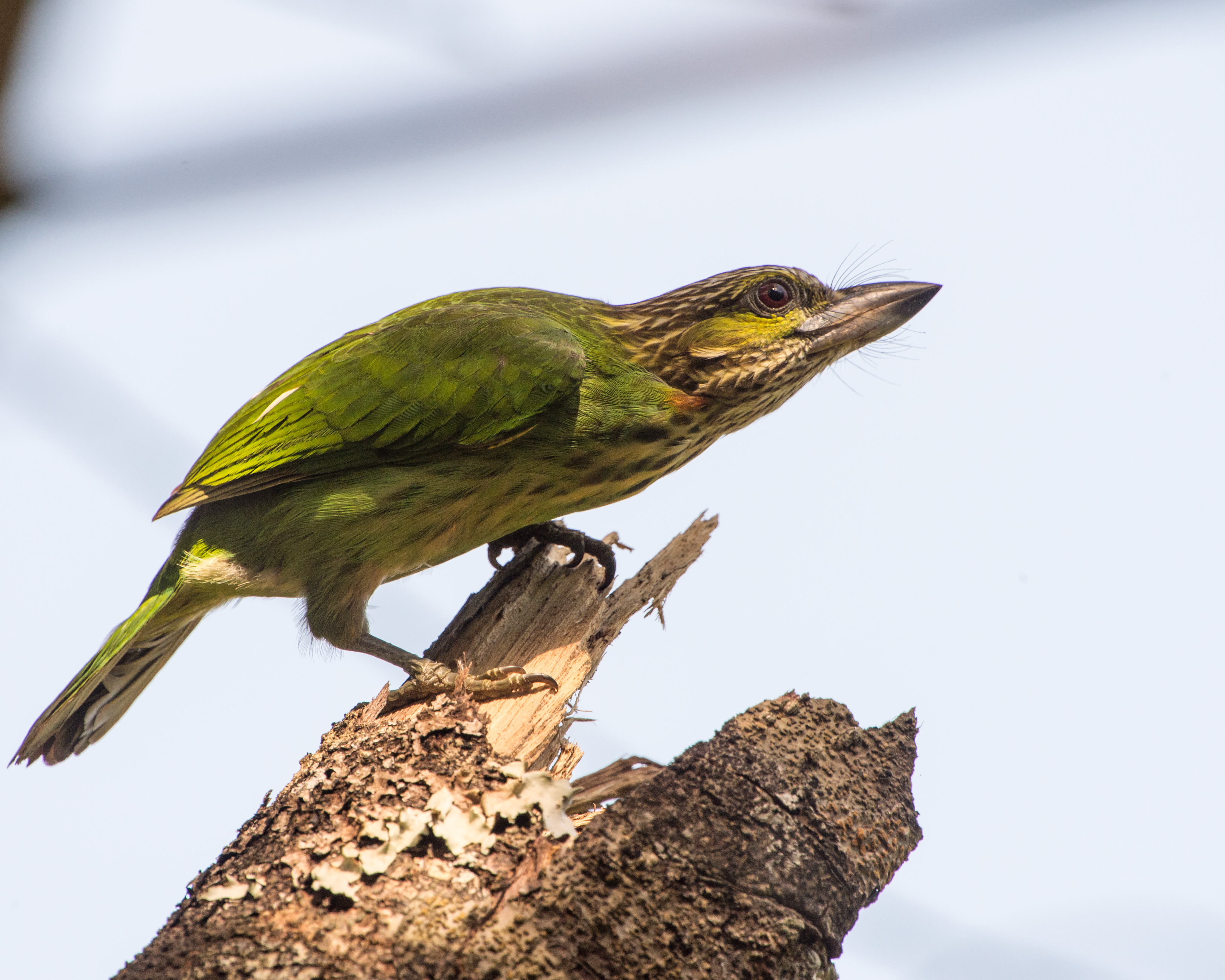 30th Nov 2013 Kaeng Krachan National Park, Petchburi, Thailand